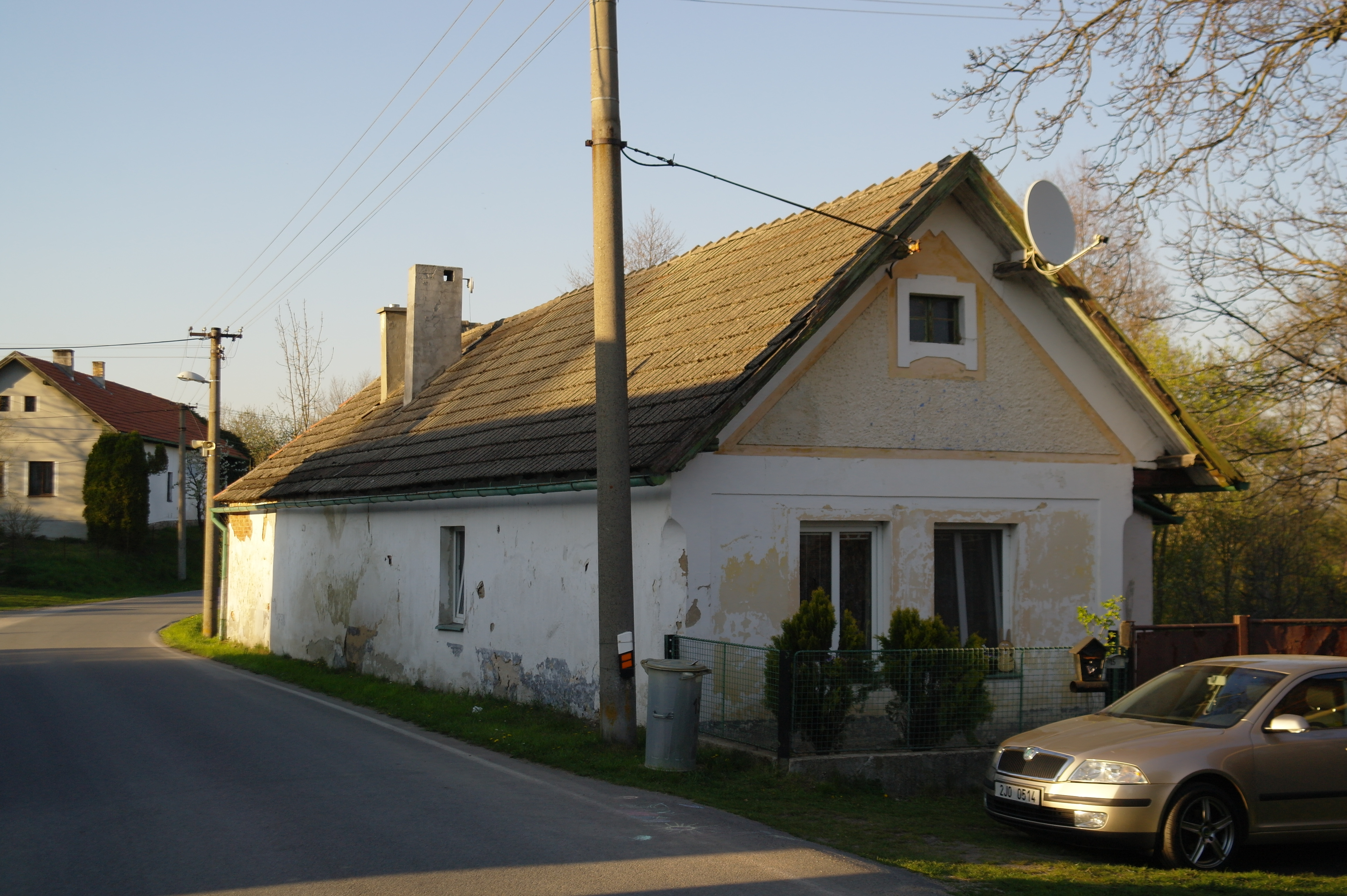 Třebelice. Česká republika.